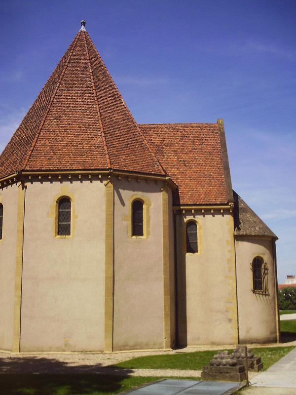 La chapelle des templiers de Metz.